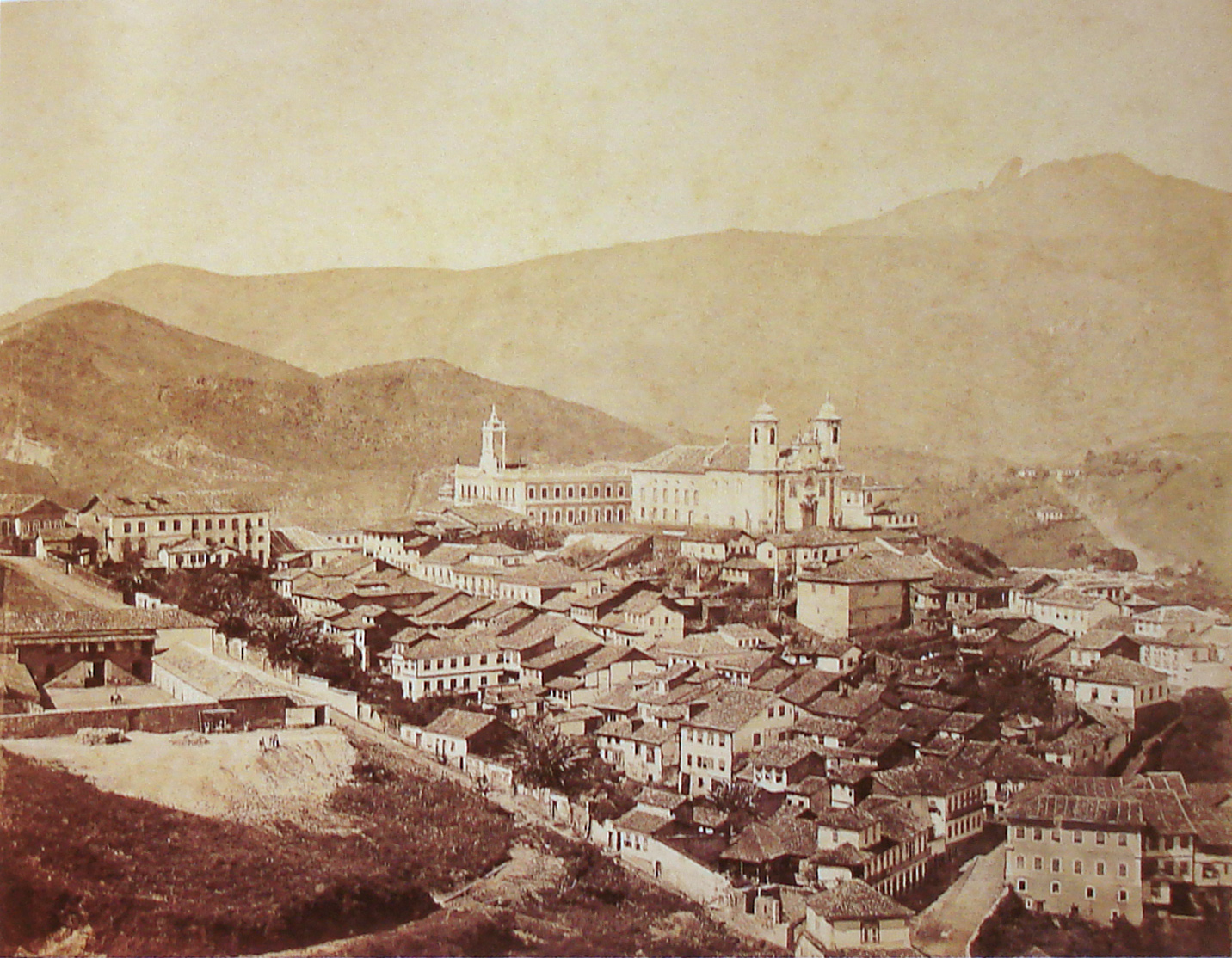 Ouro Preto em c. 1870, fotografia em albúmen